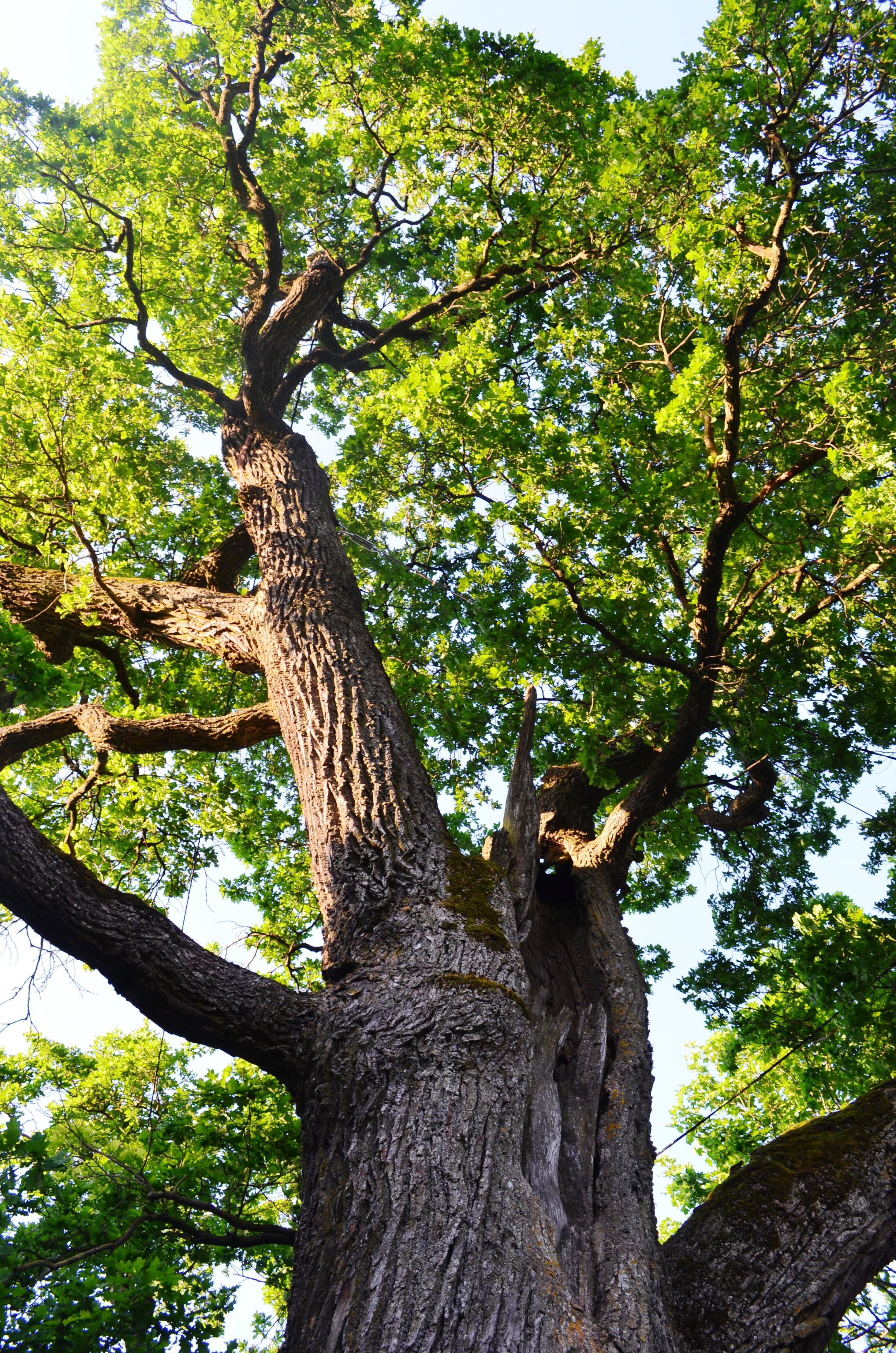 Grinių kapinių ąžuolas, Kėdainių raj.